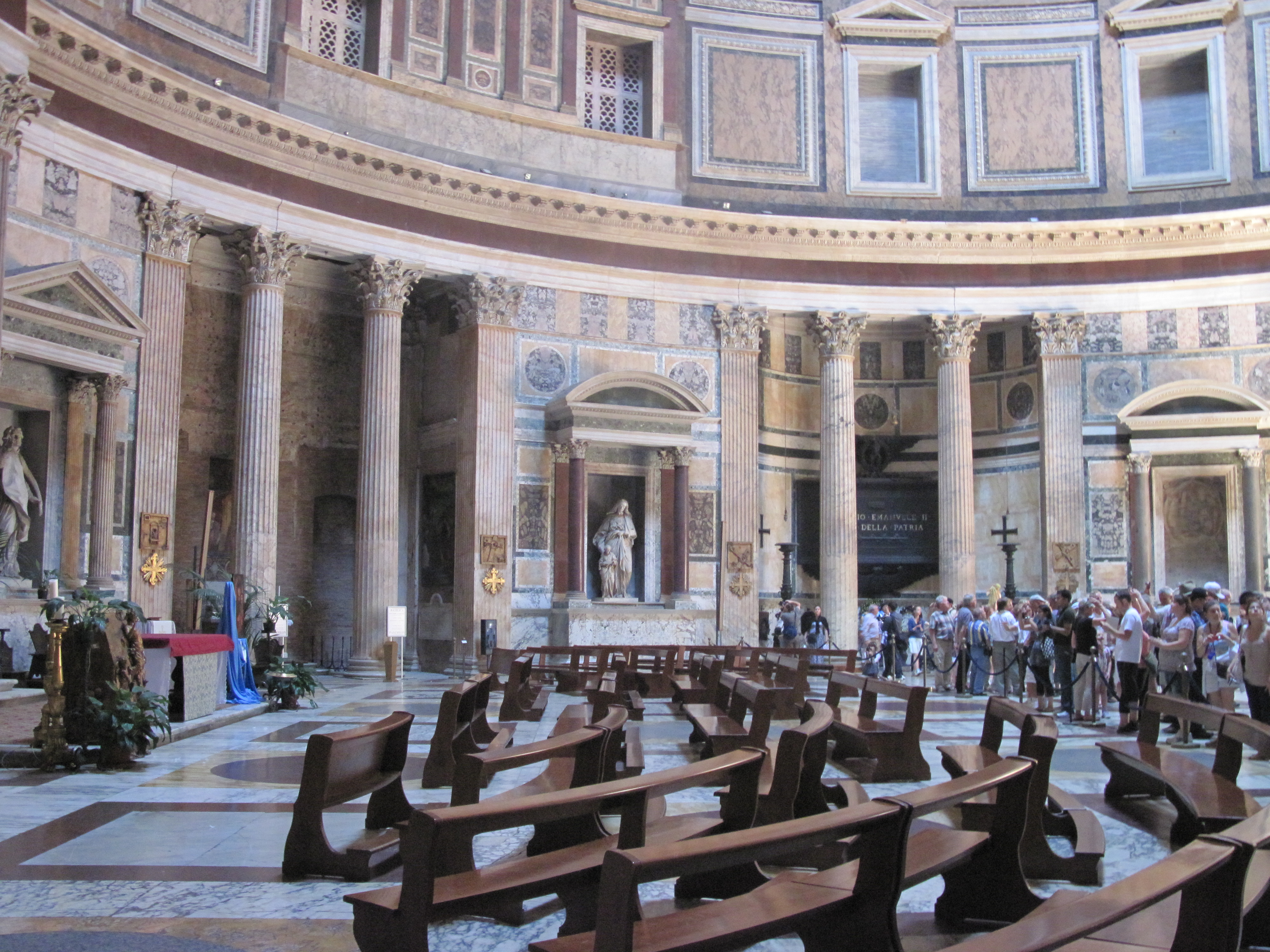 Внутреннее убранство Пантеона